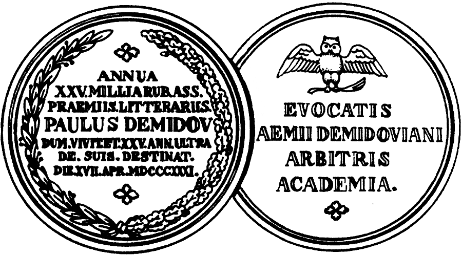 Демидовская премия, рисунок медали XIX века